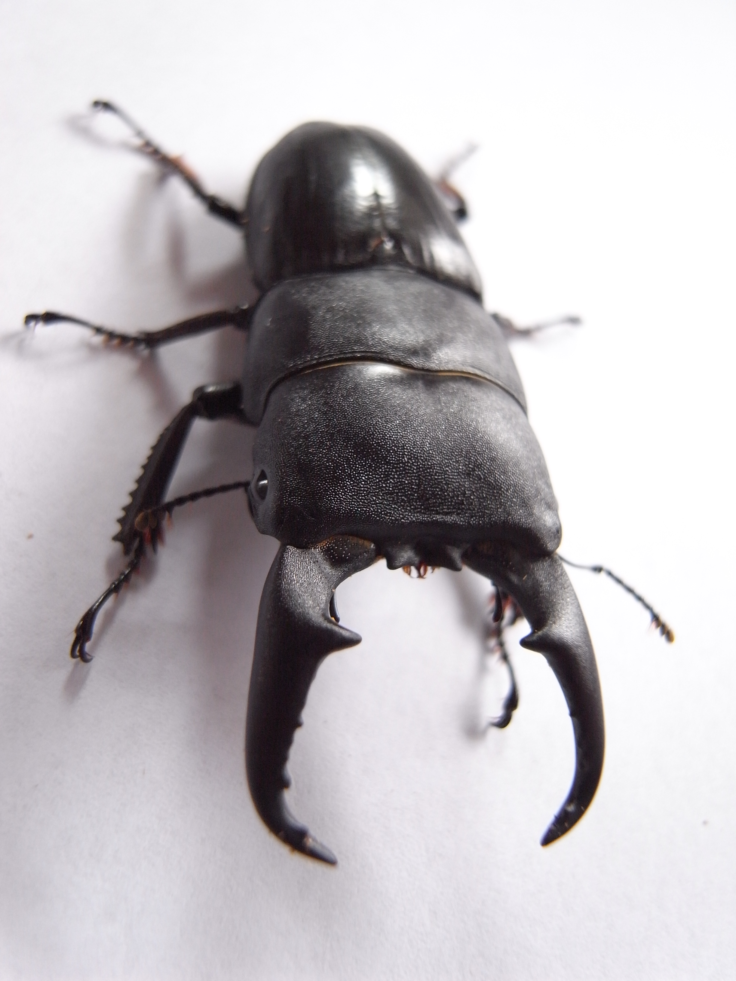 採集地：東京